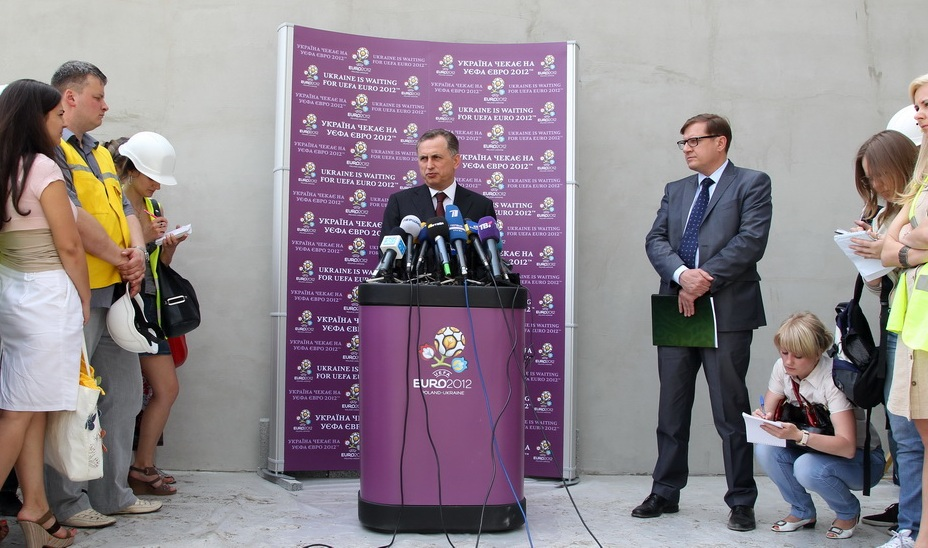 Борис Колесніков - куратор Євро-2012 в Україні